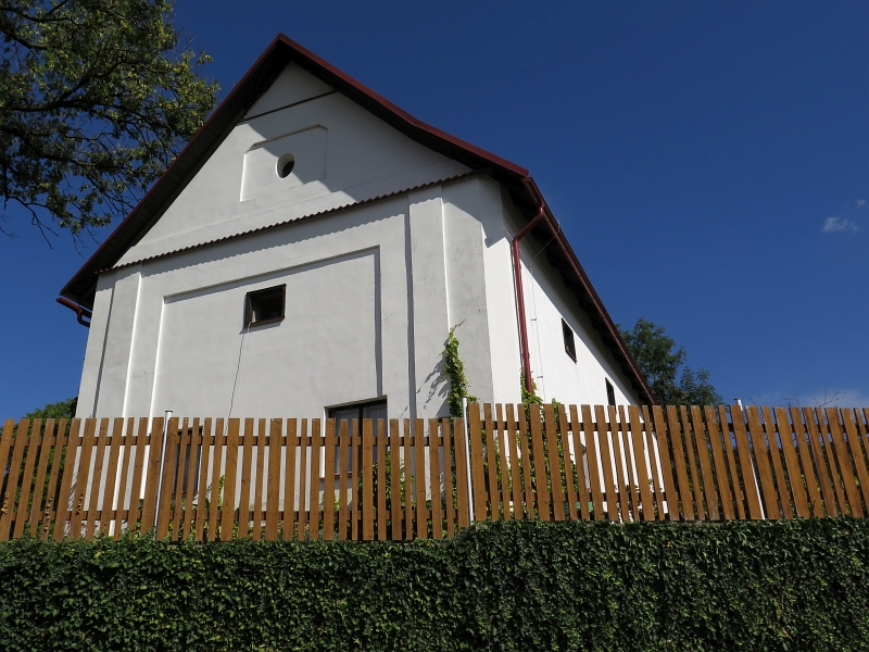 Kostel svatých Petra a Pavla změněný na sýpku, Úloh 28, Úloh.